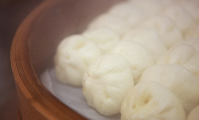 桃太呂の長崎ぶたまん